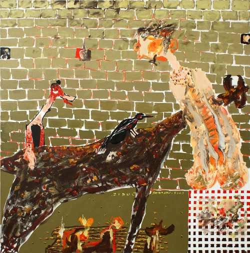 Teodor Moaru, Zidul, 2009 (ulei pe pânză, 100x100 cm)